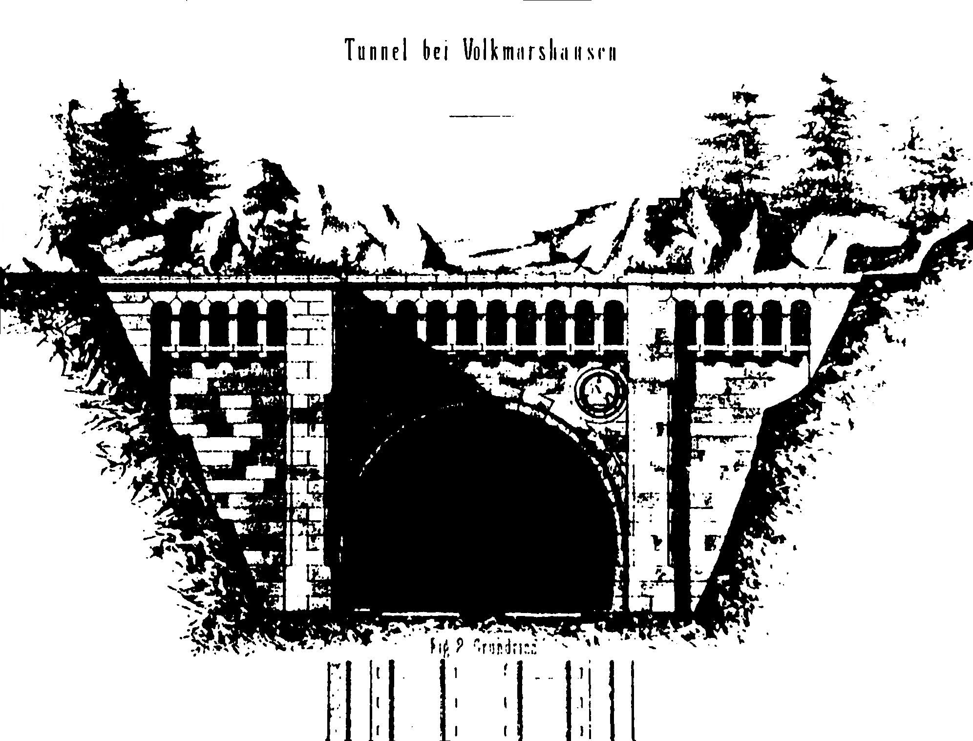 Grundrisszeichnung Volkmarshäuser Tunnel (Südportal) der Hannöverschen Südbahn